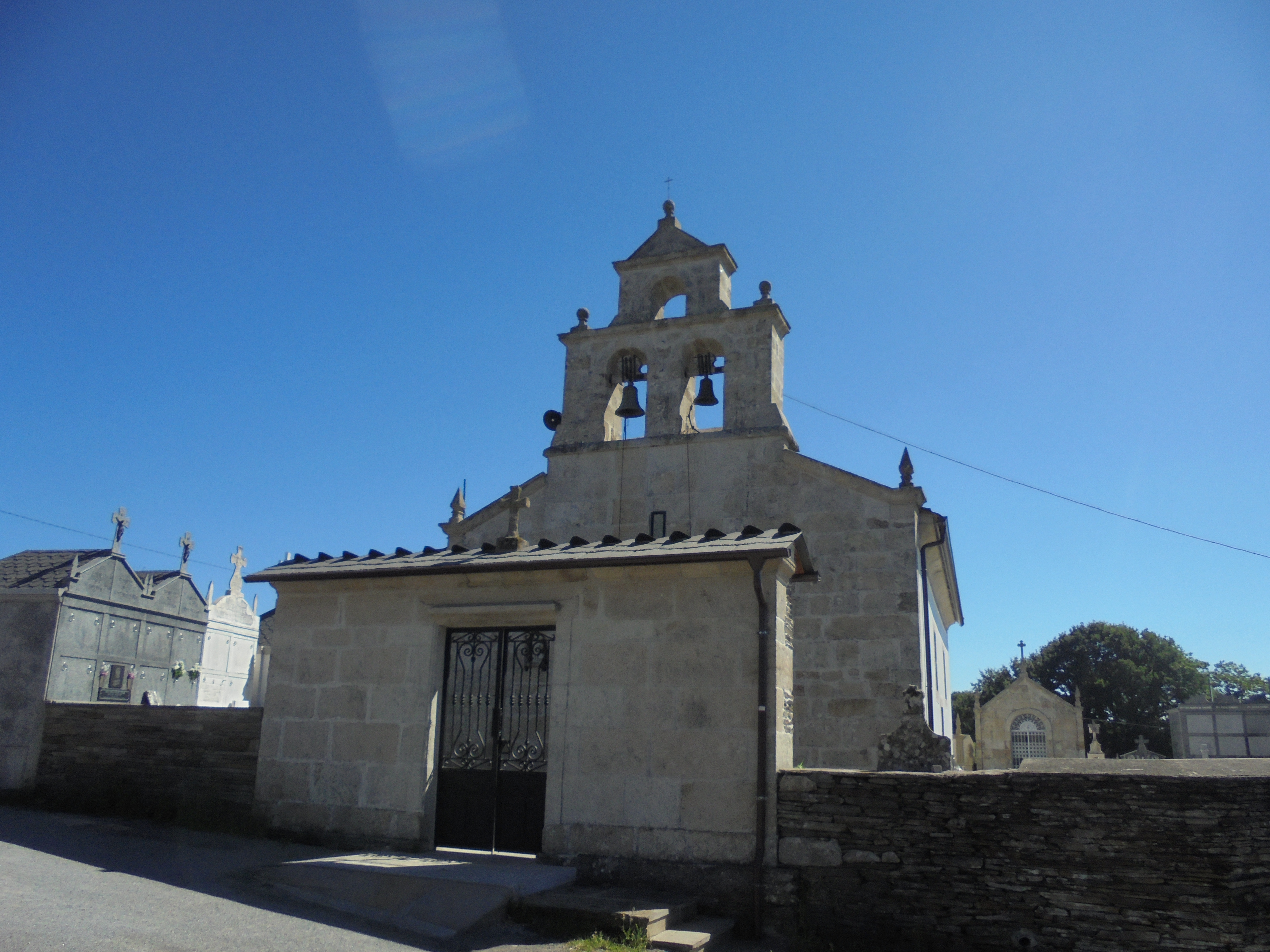 Igrexa parroquial de San Xoán do Campo ( Lugo)